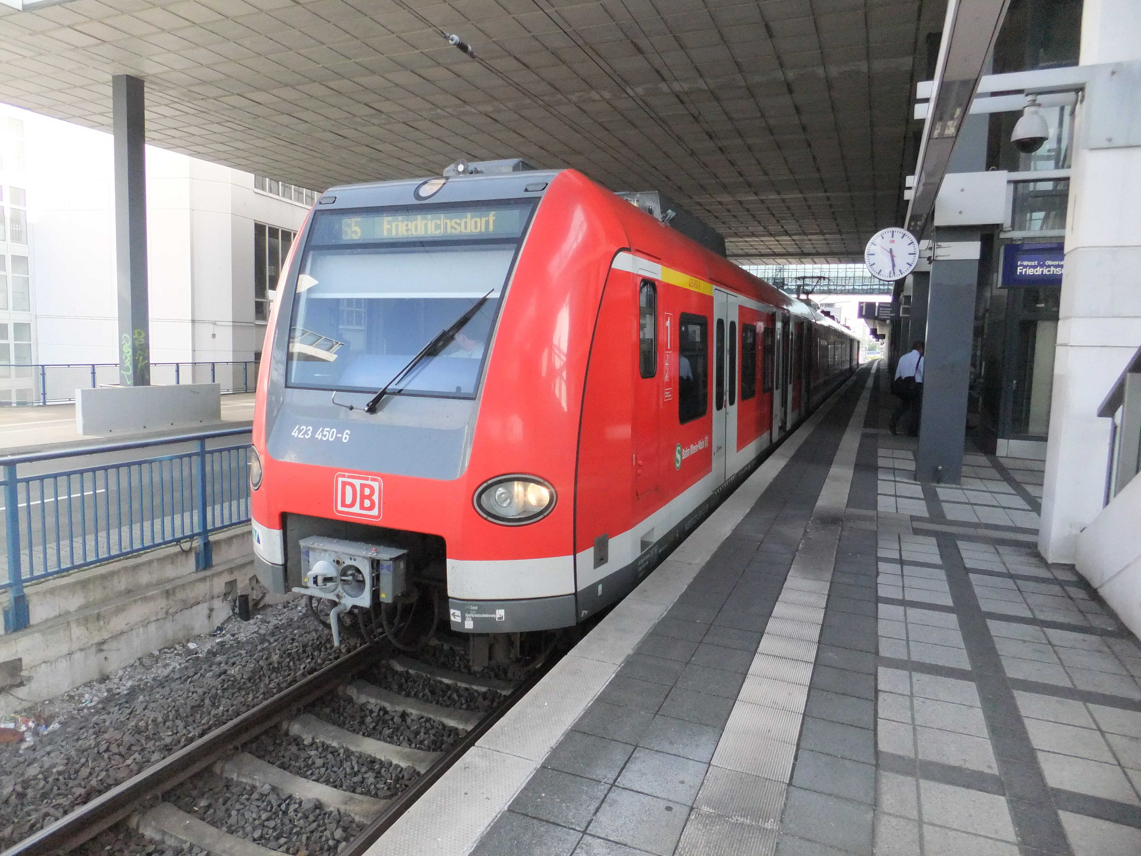 DBAG-Baureihe 423 als Zug der S5 der S-Bahn Rhein-Main im Bahnhof Frankfurt am Main Messe